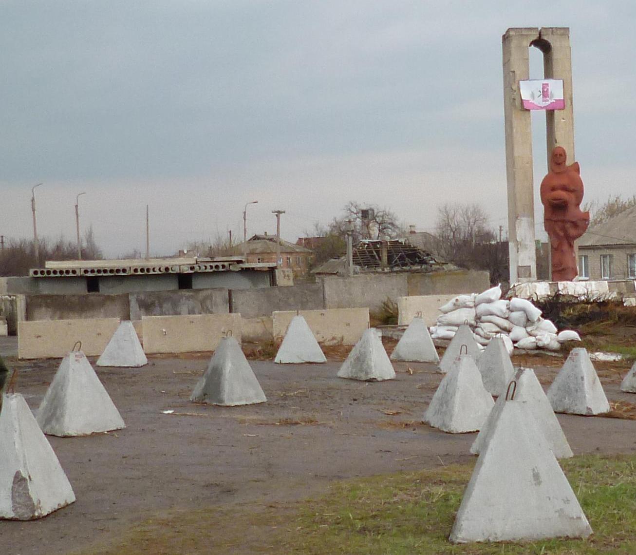 Блокпост у Станиці Луганській